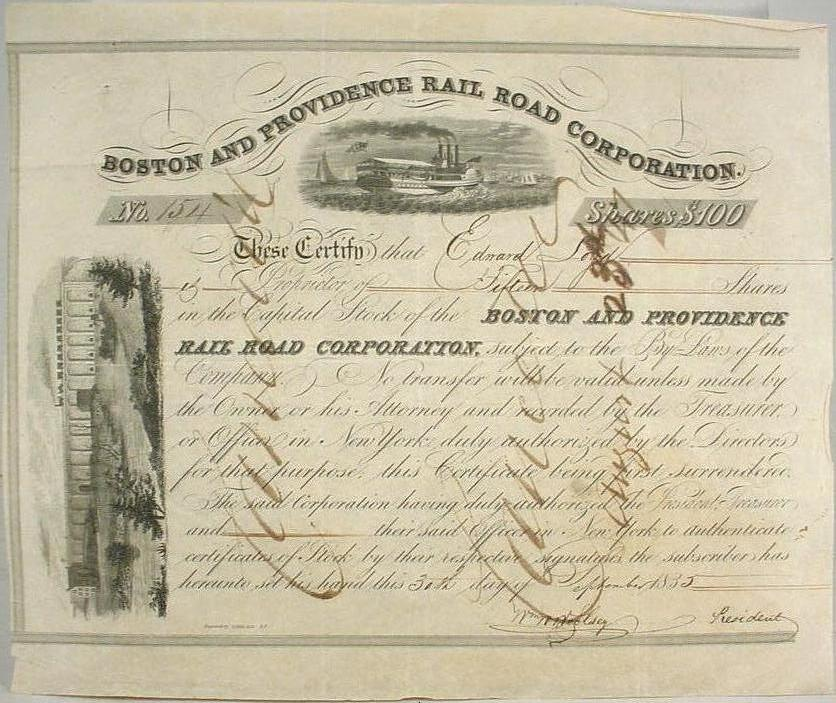 BPRR Stock